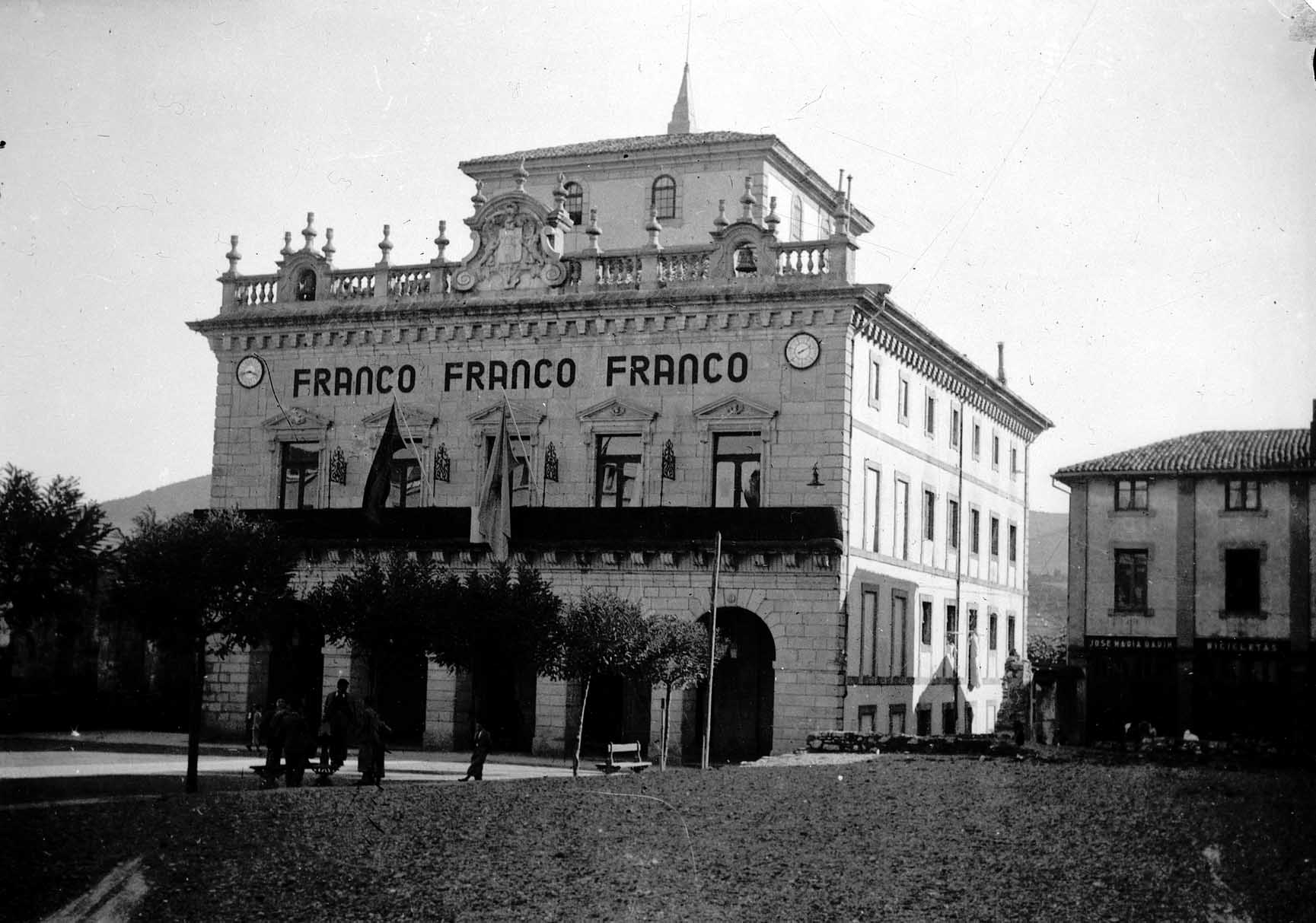 Basa Sunda: Irún. Ayuntamiento